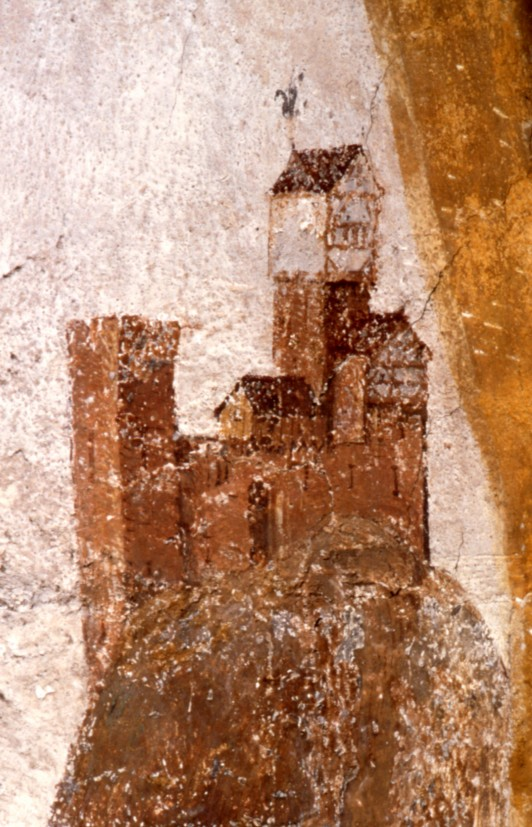 Fresko der Burg Hohenstaufen.